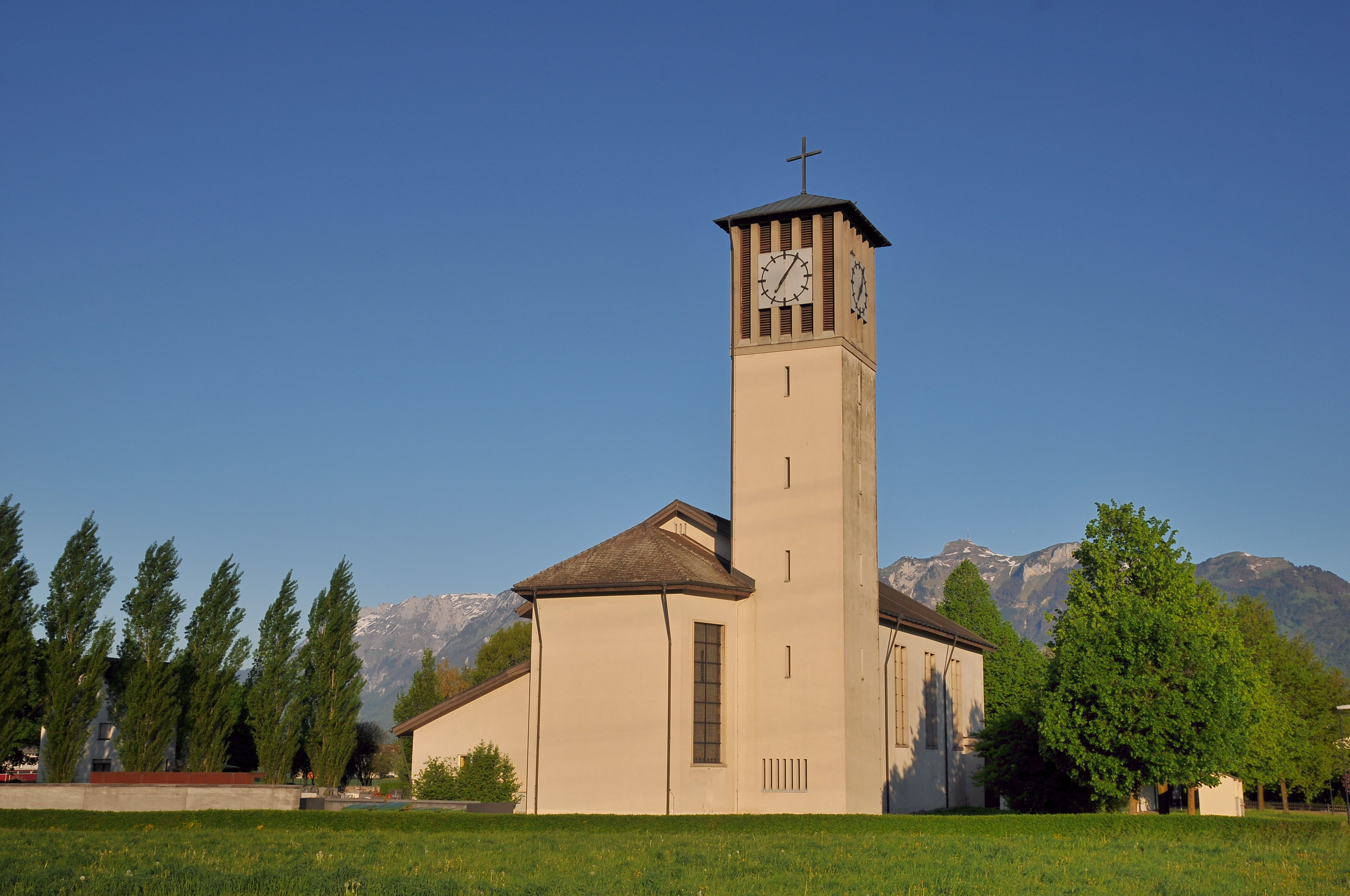 Expositurkirche hl. Eusebis, in Brederis (Rankweil). Erbaut nach Plan von Jakob Marte im Jahr 1958.